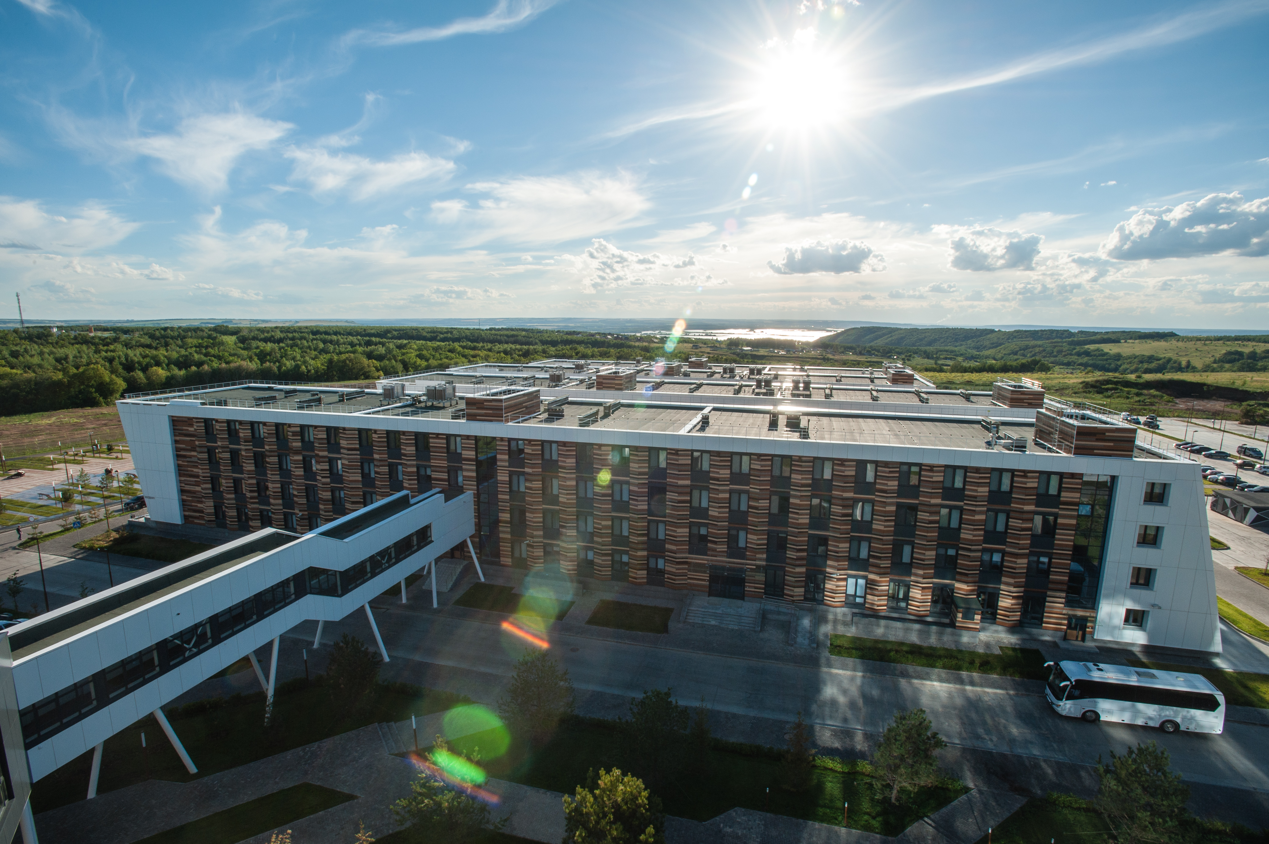 Вид на университетский кампус в Иннополисе